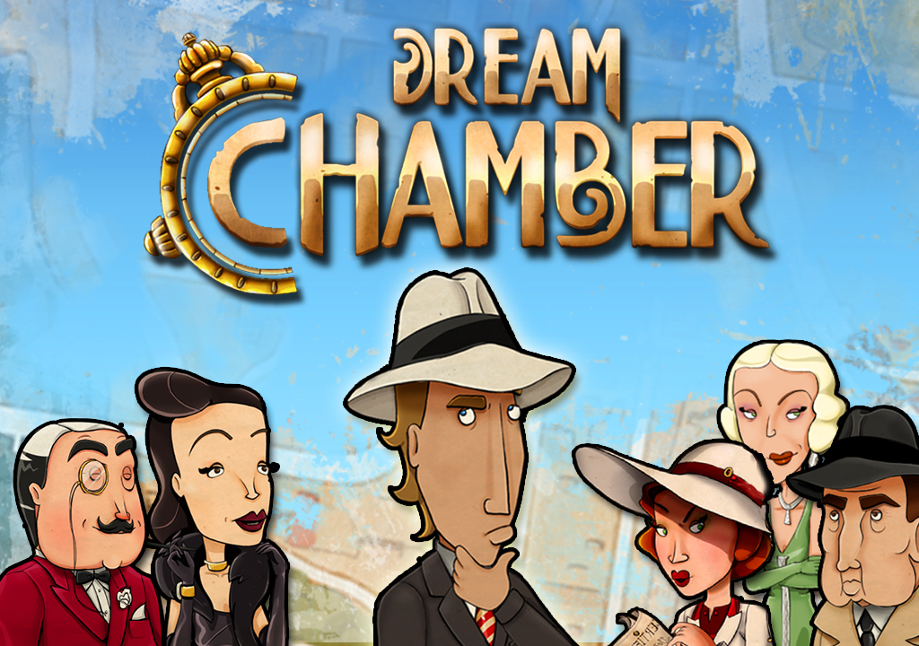 Capture d'écran - Présentation du jeu